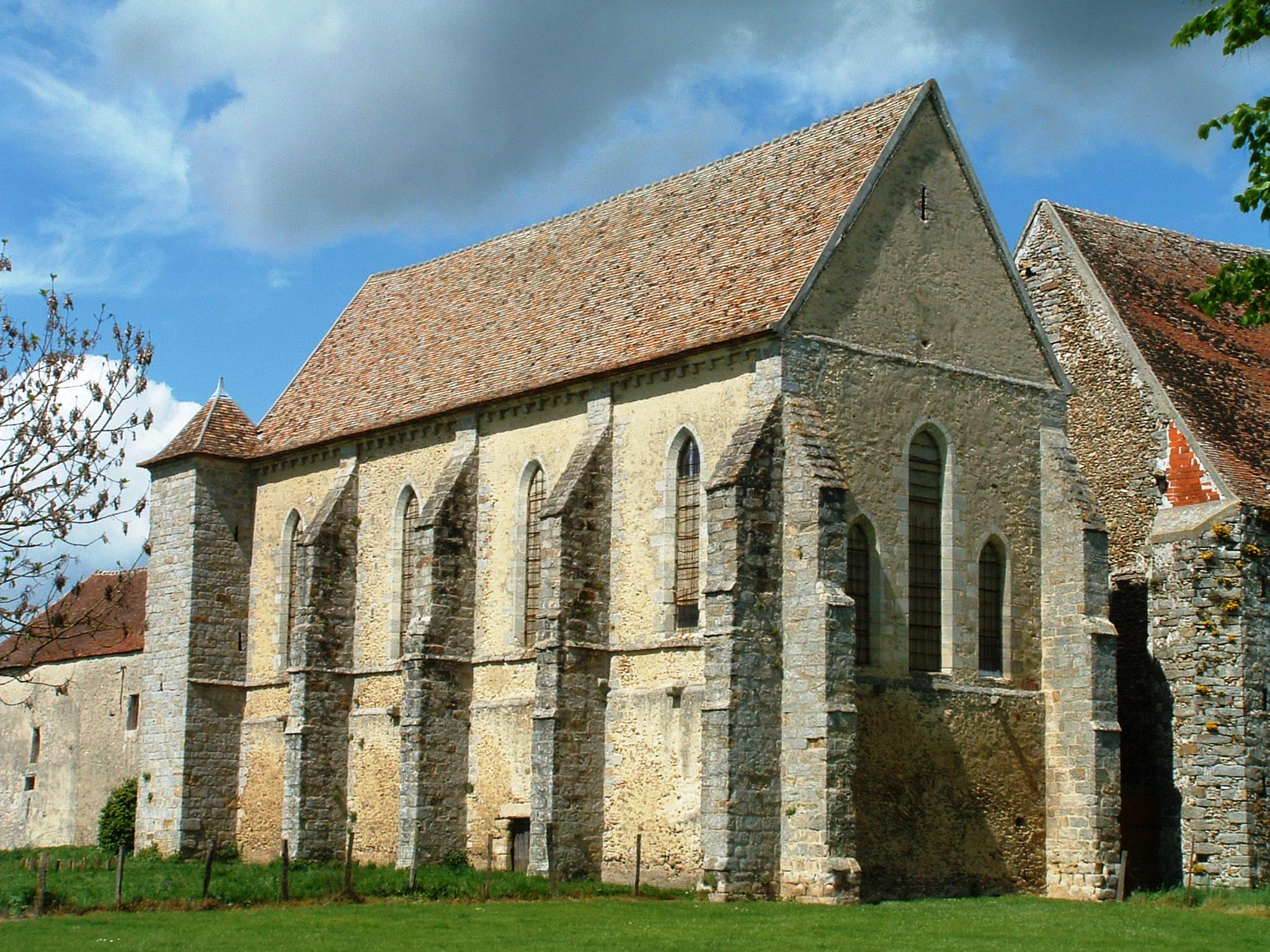 Commanderie de Coulommiers